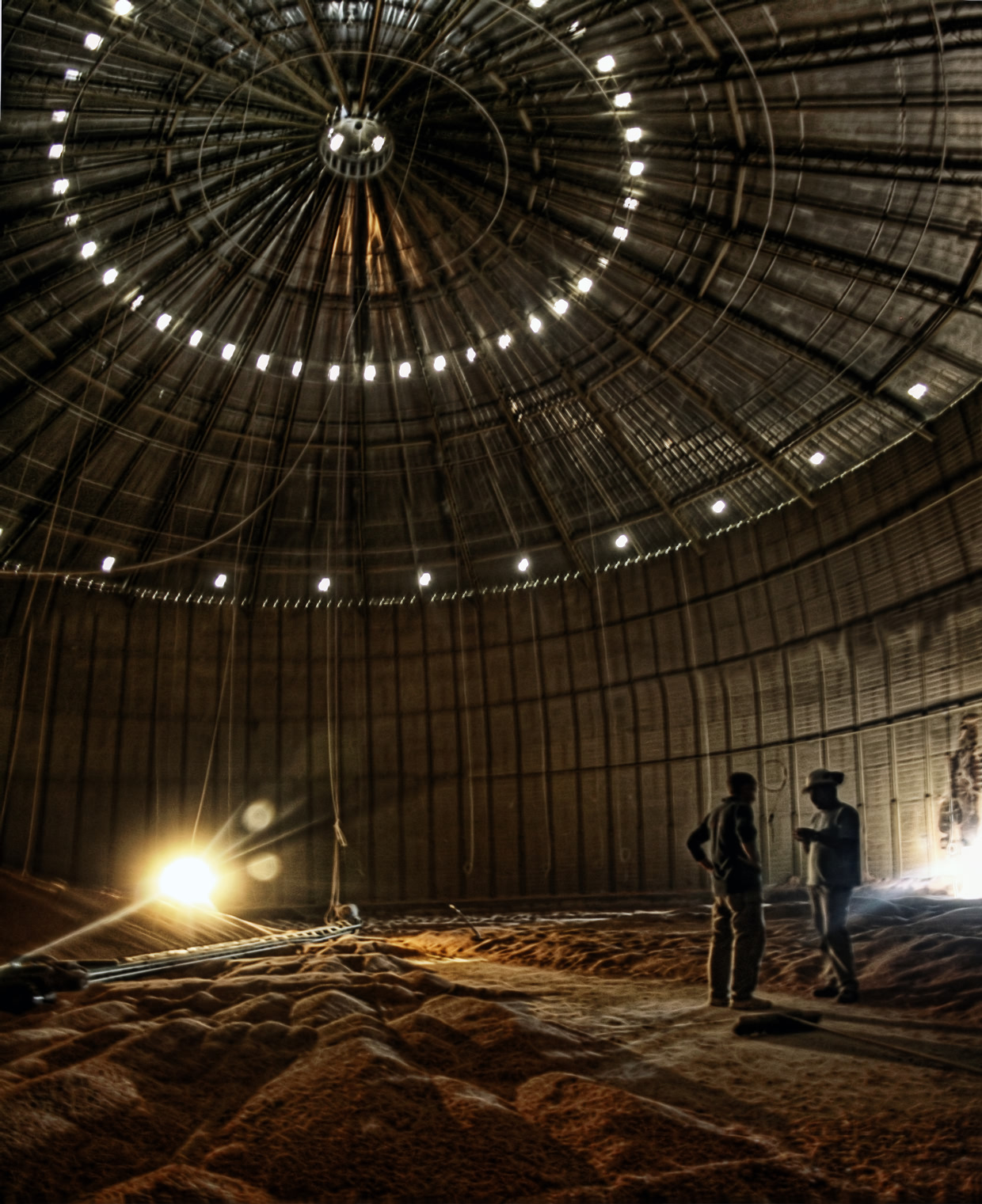 View On Black Vista interior del silo de granos de 100000 toneladas perteneciente a la Cooperativa Agricultores Federados Asociados, en Armstrong, provincia de Santa Fé, Argentina